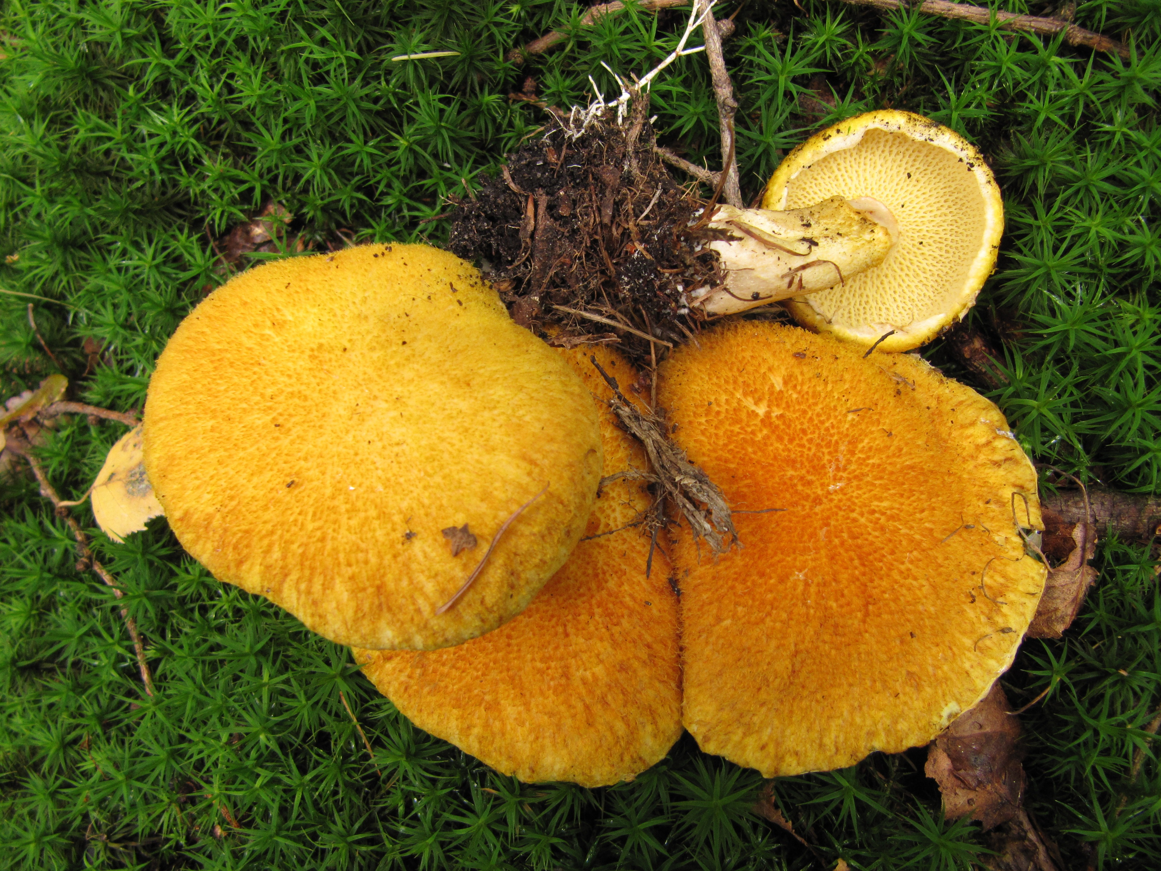 Gelbe Form des Hohlfußröhrlings (Suillus cavipes f. aureus)